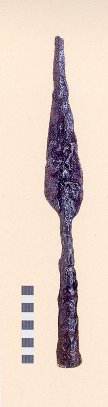 Cuspide di lancia in ferro con punta spezzata e mancante; lungo innesto a cannone di forma conica. Lama a foglia allungata e stretta e lieve costolatura centrale. Questo tipo di forma perdura invariato in ambito golasecchiano per secoli (da fine VIII a V-IV sec. a.C.) e prosegue in epoca gallica.